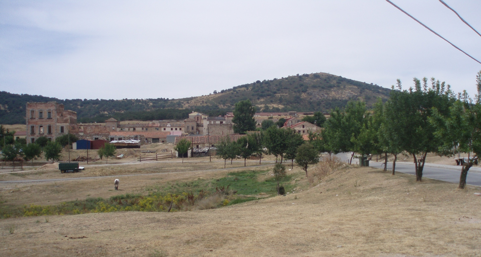 Valsaín, un pueblo perteneciente al municipio de San Ildefonso de La Granja (Segovia, España).